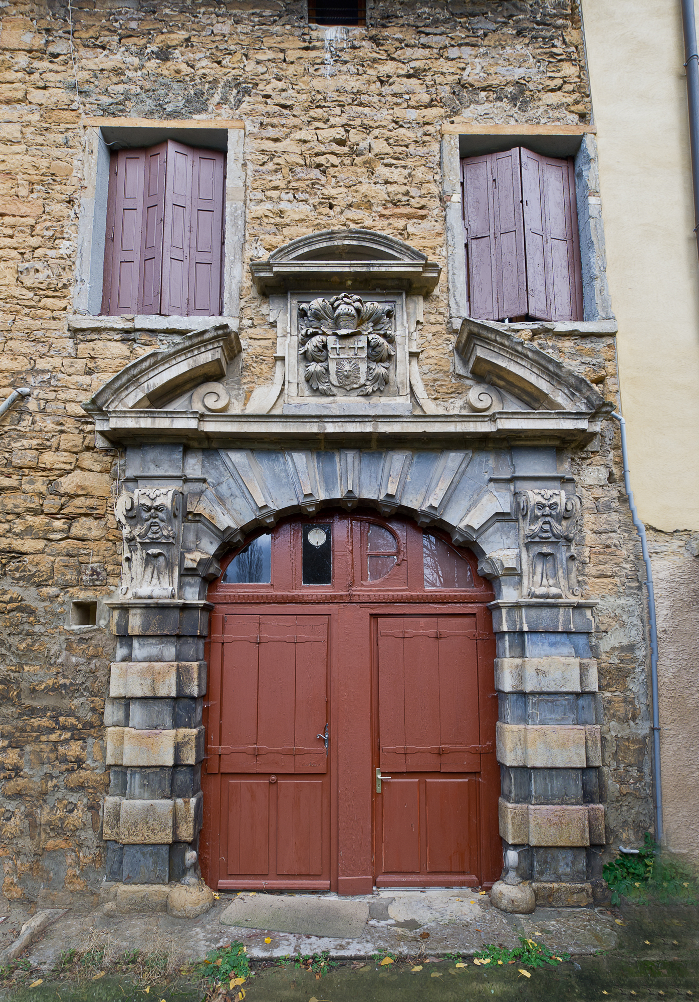 Château du Buisson, 450 Rue du Buisson (Inscrit, 1926) .